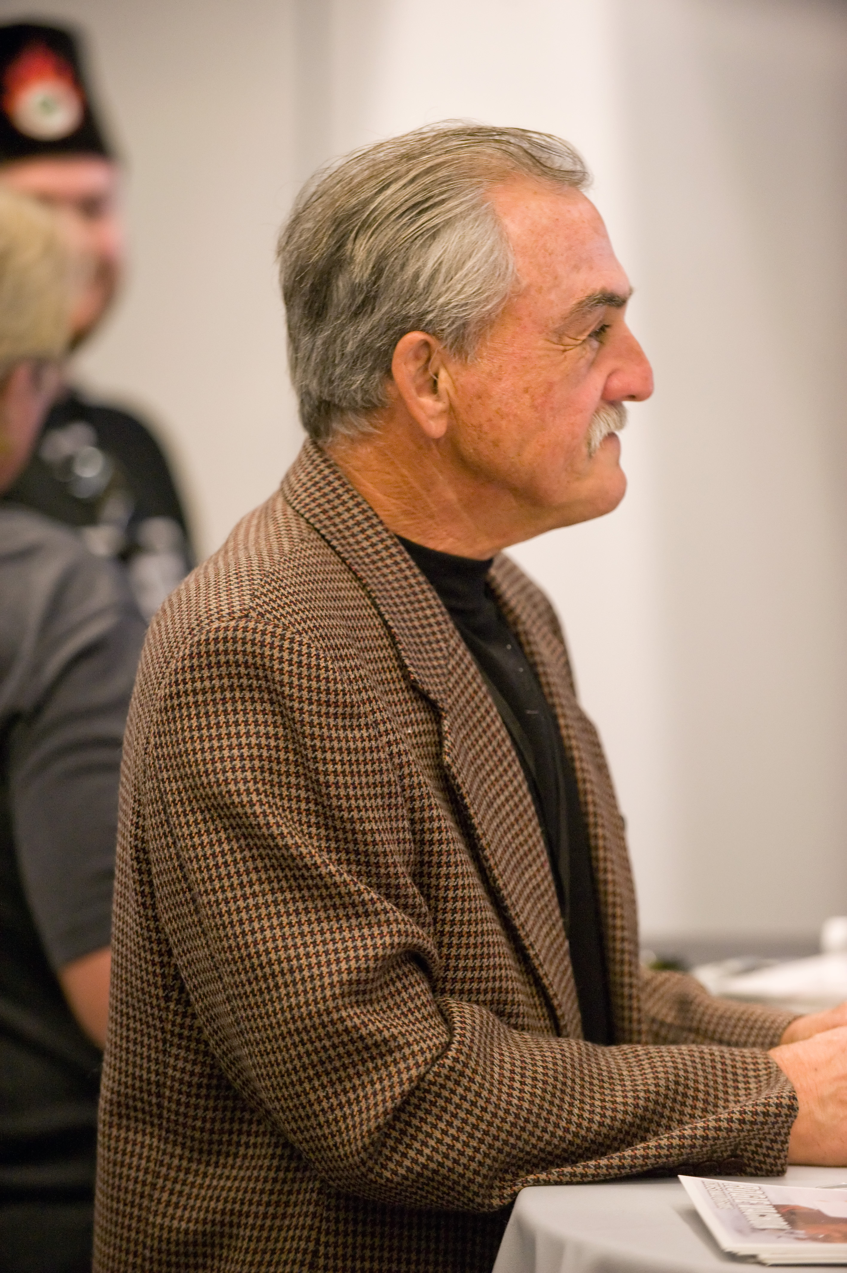 L.A. Kings goalie 1971-78